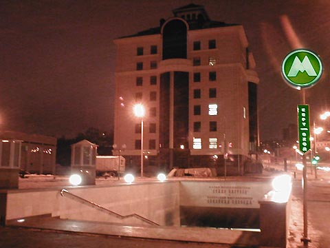 Kazan Metro Office адмнистративно-инженерный корпус метро Казани